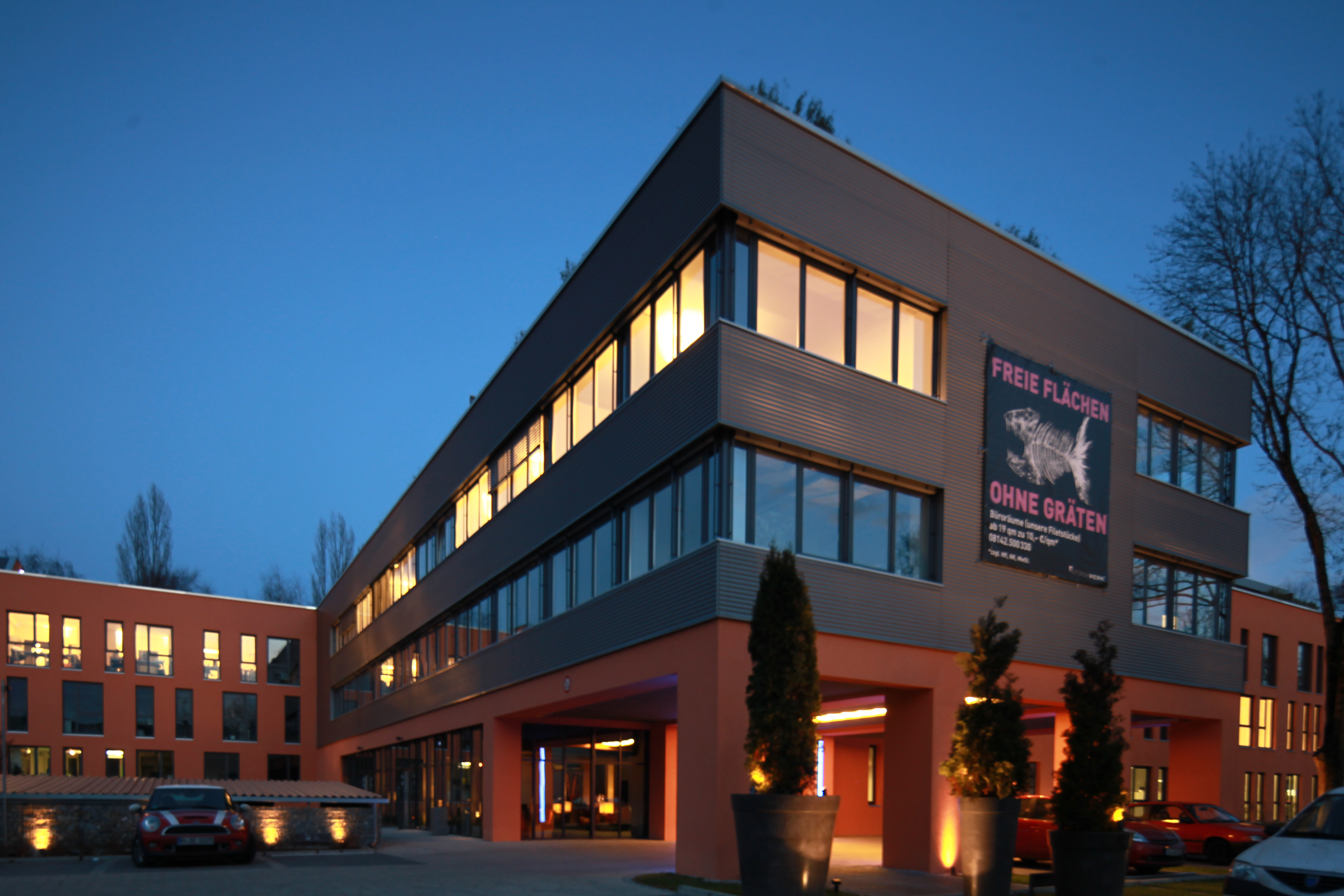 Das Stockwerk in der Oppelner Straße 5